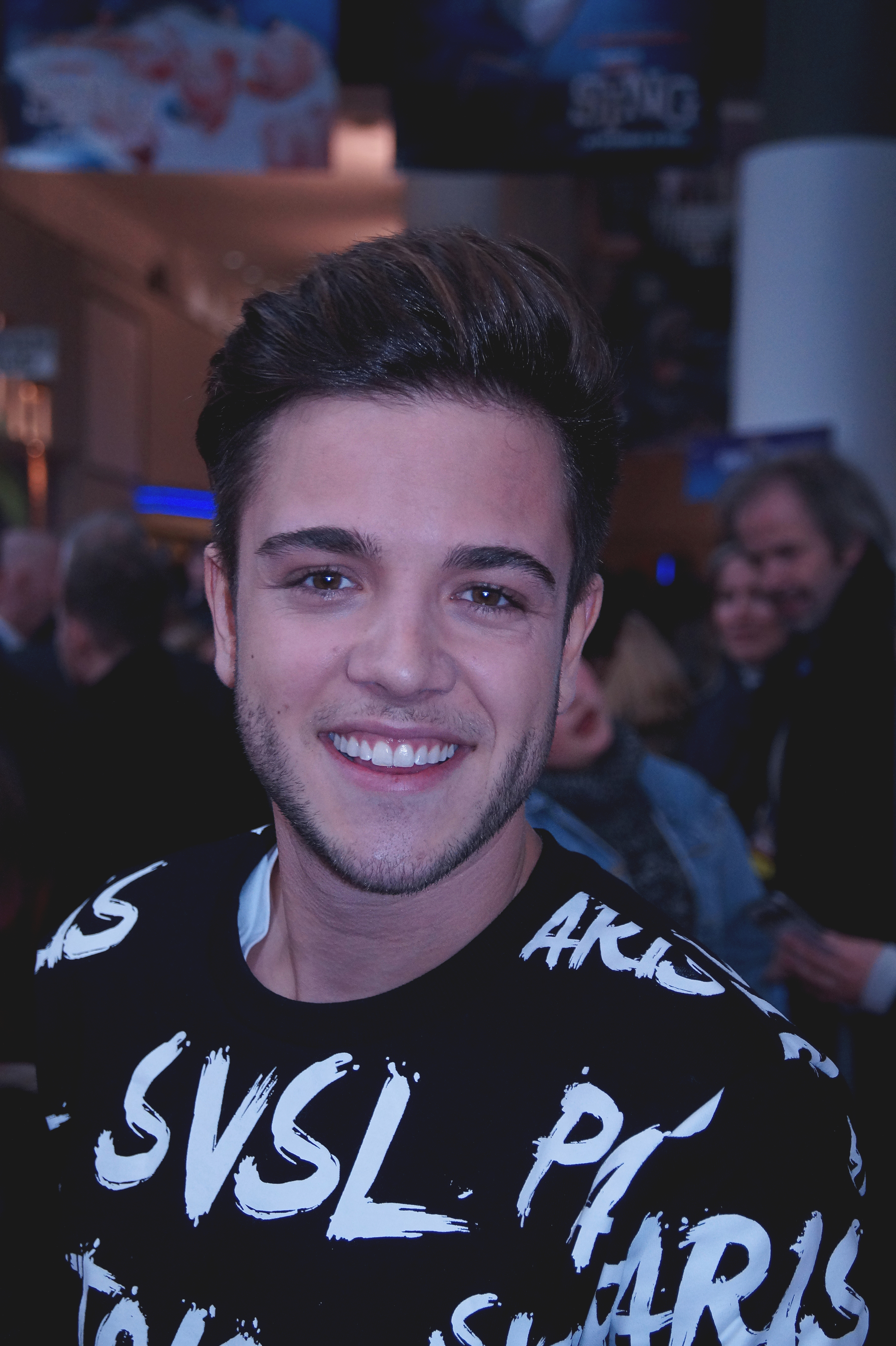 Luca Hänni bei der Europa-Premiere von dem neuen Animationsfilm "SING", am 27.11.2016 im Kölner Cinedom.